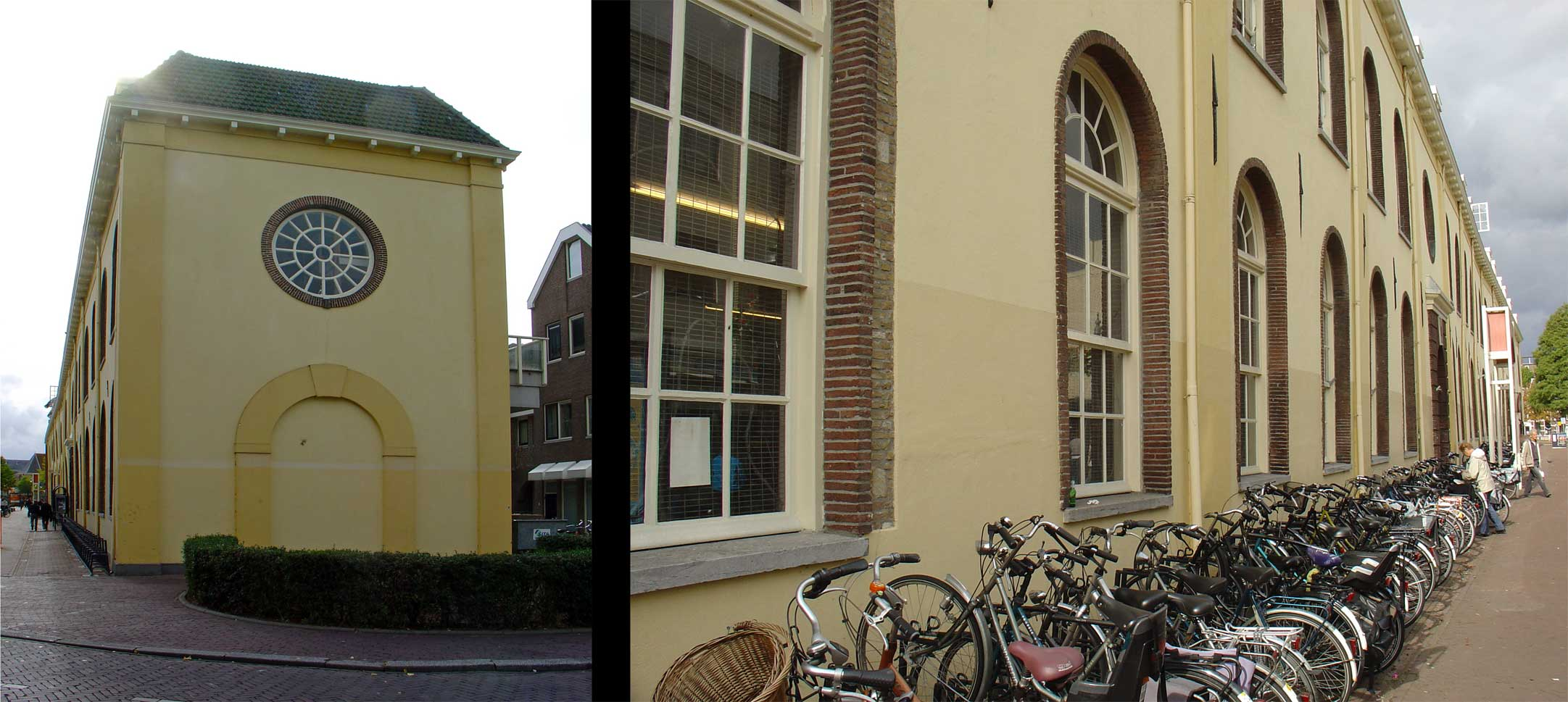 Gebouw van het voormalige Maria Magdalenconvent c.q. Pesthuis, c.q. kazerne, c.q. Arcade bioscoop te Gouda